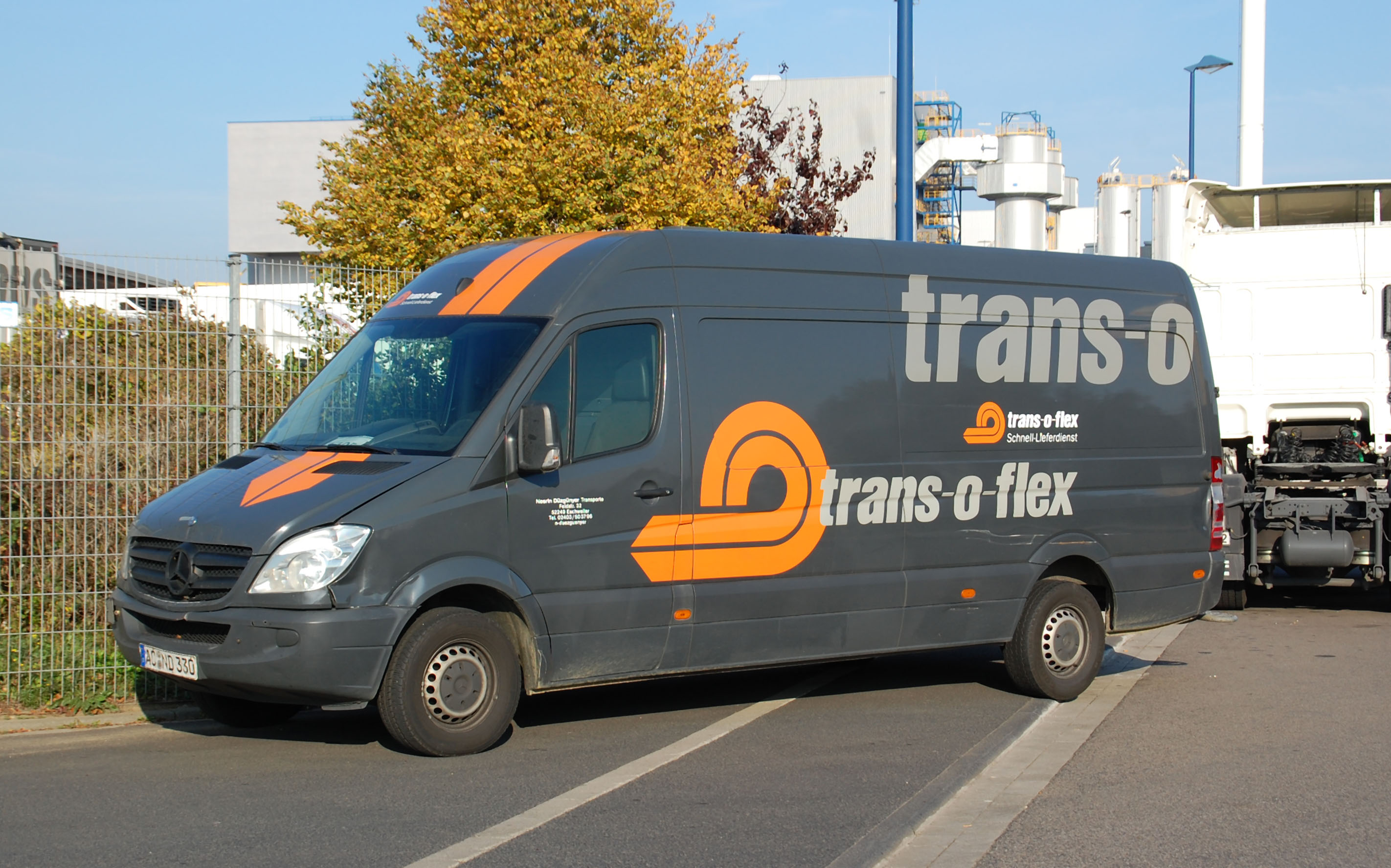 Mercedes Sprinter of the logistic group trans-o-flex